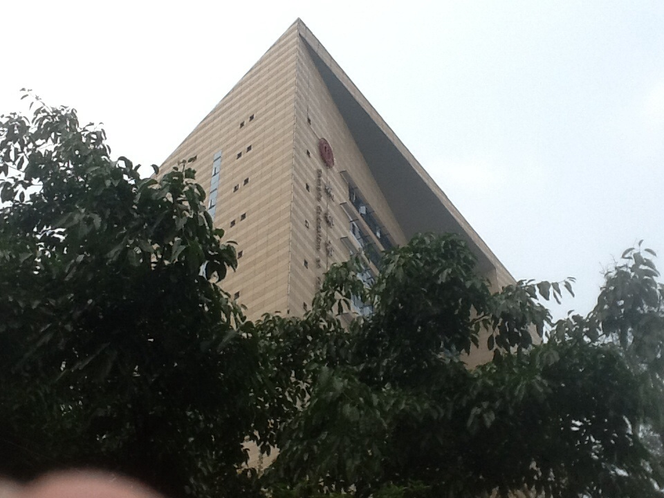 成都市文化宮的照片，攝於2014年6月